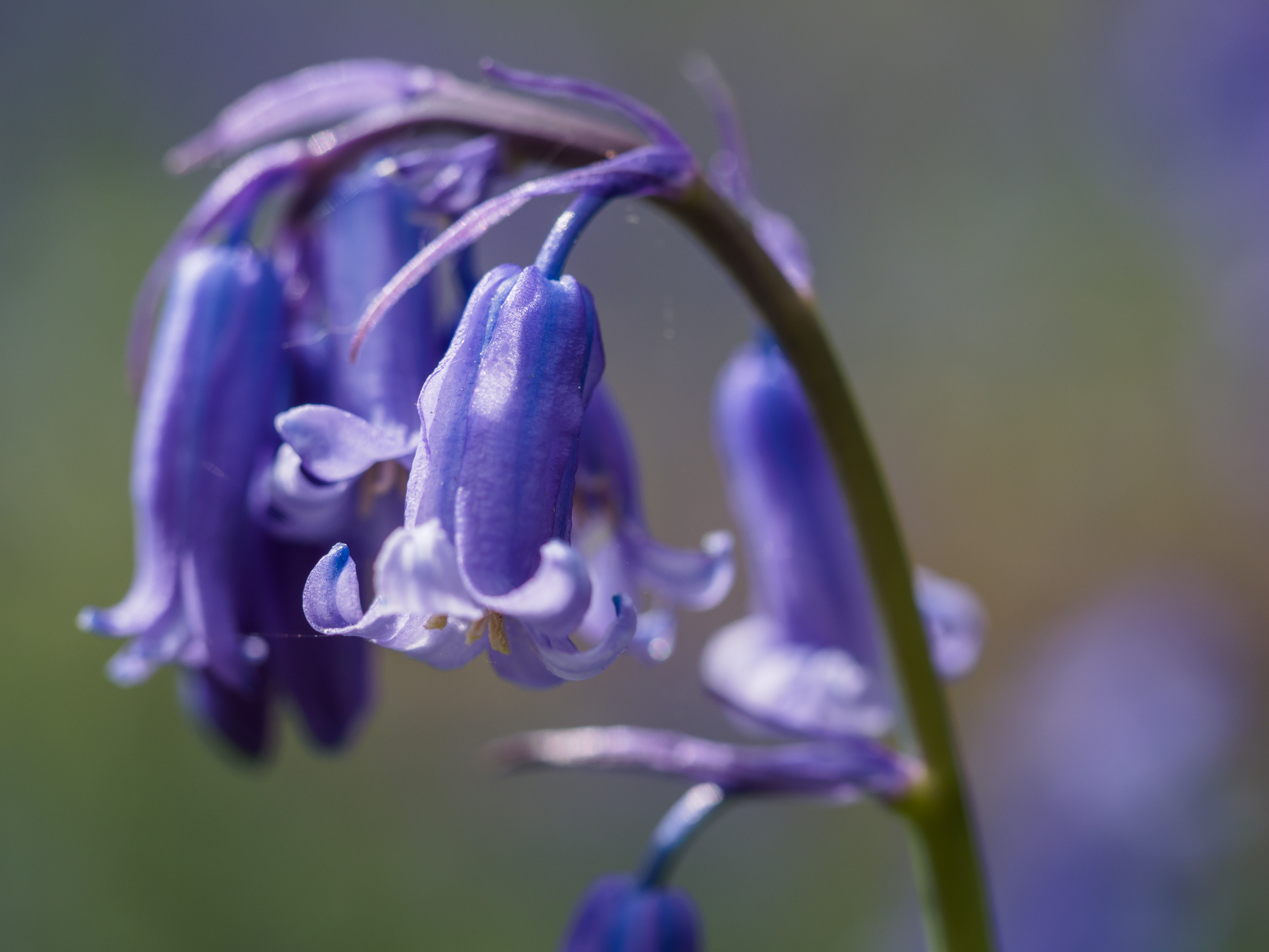 Cliveden